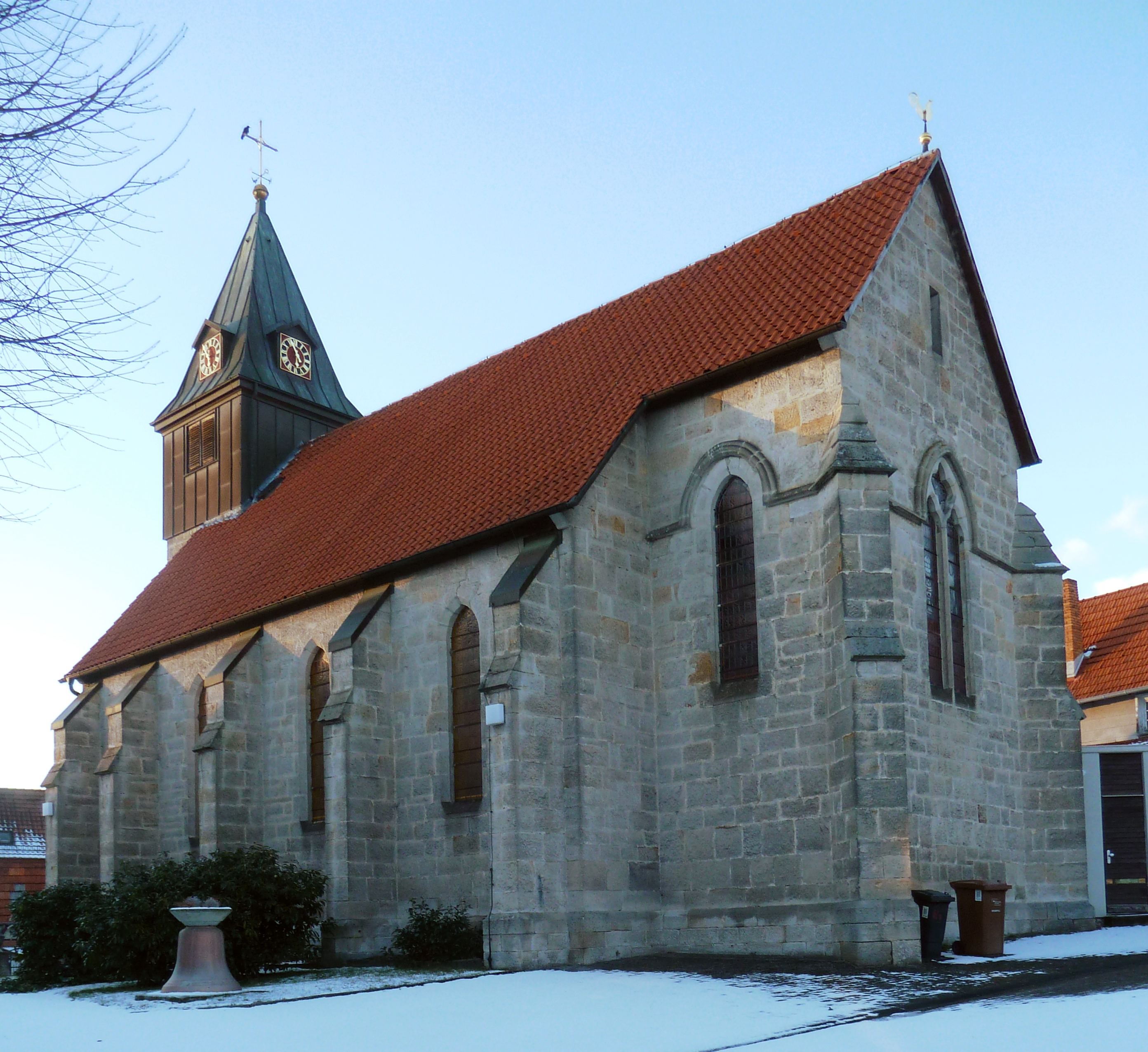 Ev.-luth. Kirche St. Anna in Nieste, Landkreis Kassel, Nordhessen. Die Kirche gehört zur Ev.-luth. Dreieinigkeits-Kirchengemeinde Escherode-Nieste in Staufenberg im Kirchenkreis Münden.